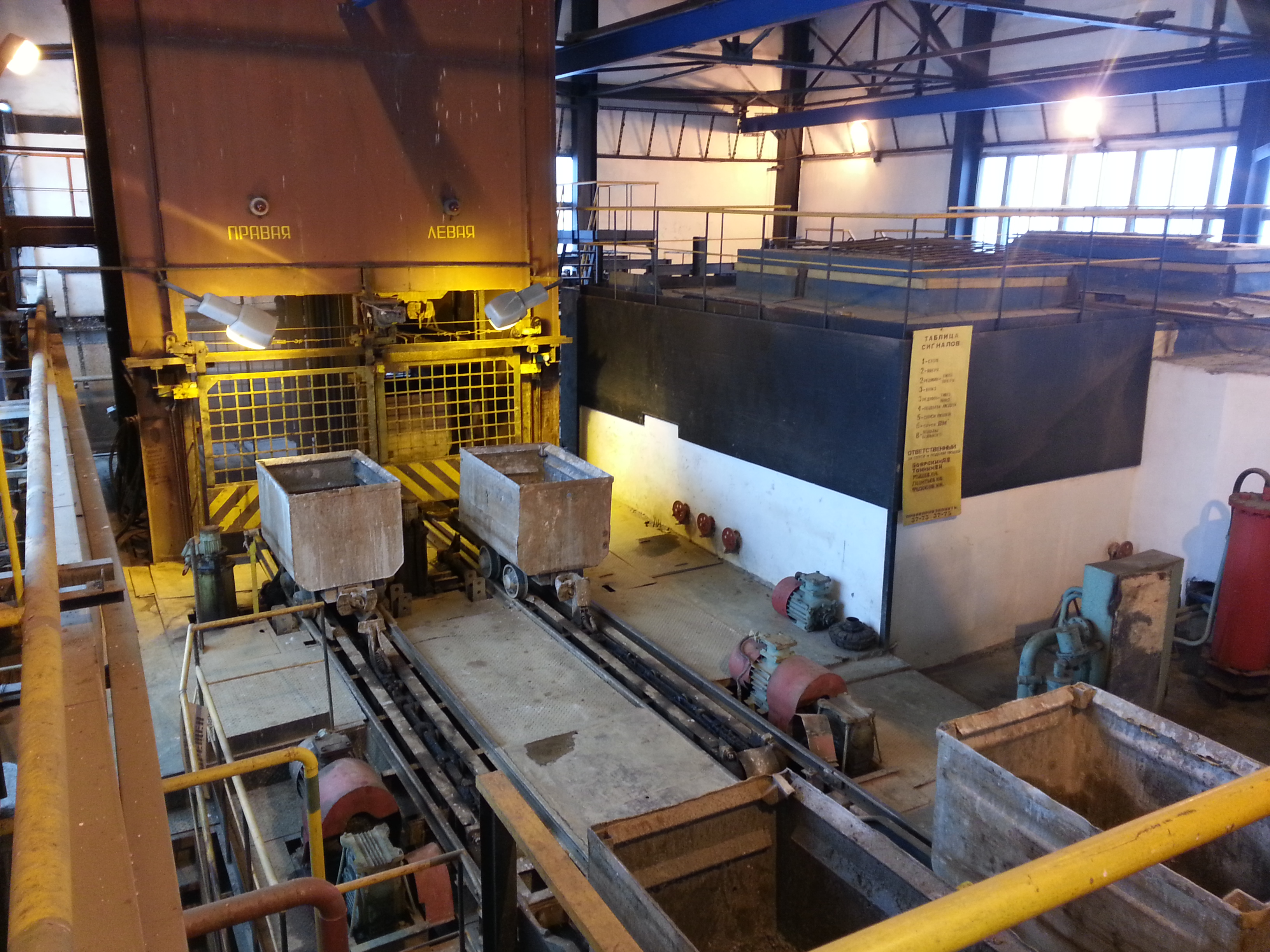 Обменный комплекс шахты Капитальная Малышевского месторождения. Видна шахтная клеть ствола Капитальный. Работники ОП Малышева спускаются в клети в шахту и выходят на околоствольный двор какого-либо горизонта: их несколько: +15; -30; -75; -120, далее идут по штрекам: Западному полевому штреку или Восточному полевому штреку.